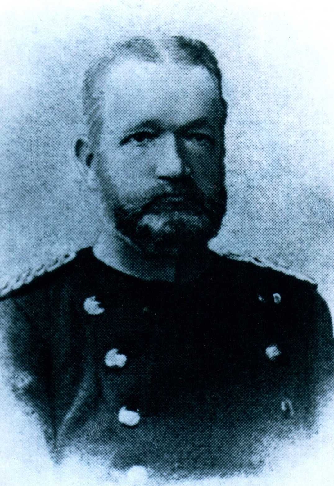 Porträtfotografie von Christian Amynt Liebe